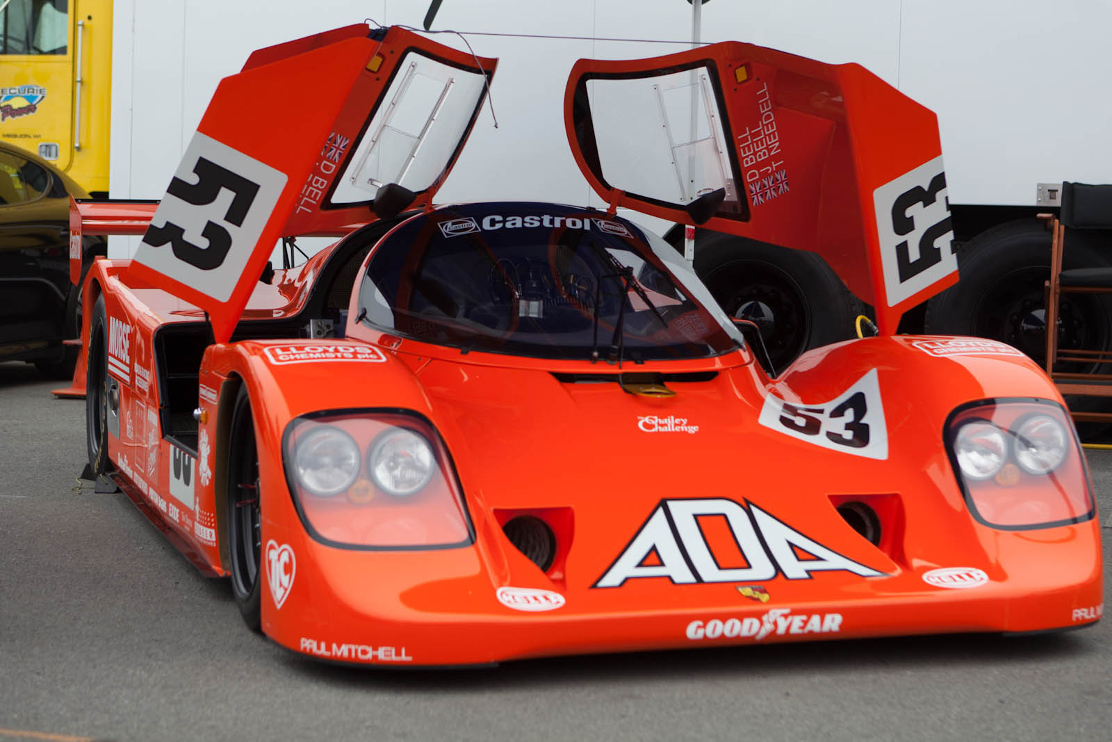 Porsche Rennsport Reunion IV